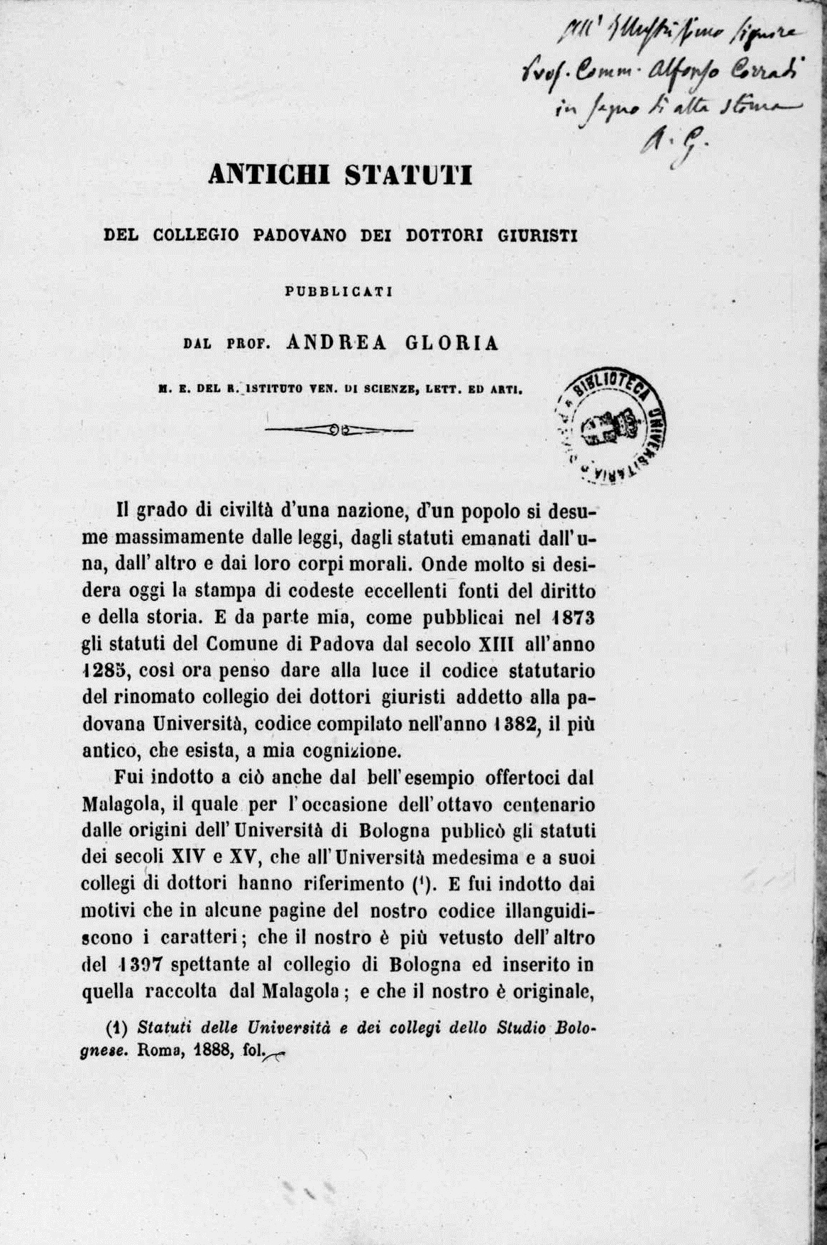 Frontespizio